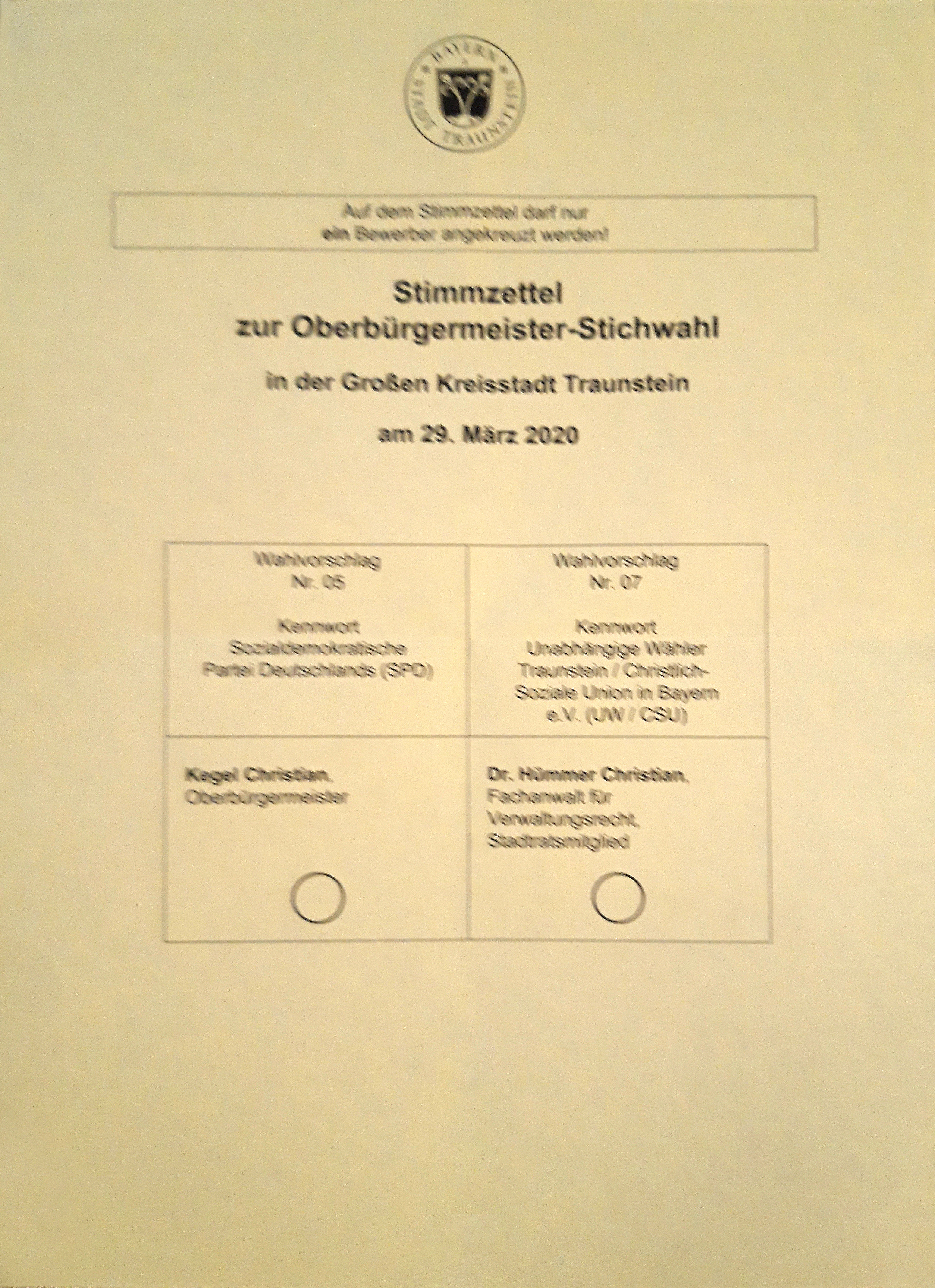 Stimmzettel zur Oberbürgermeister-Stichwahl in Traunstein. 29. März 2020